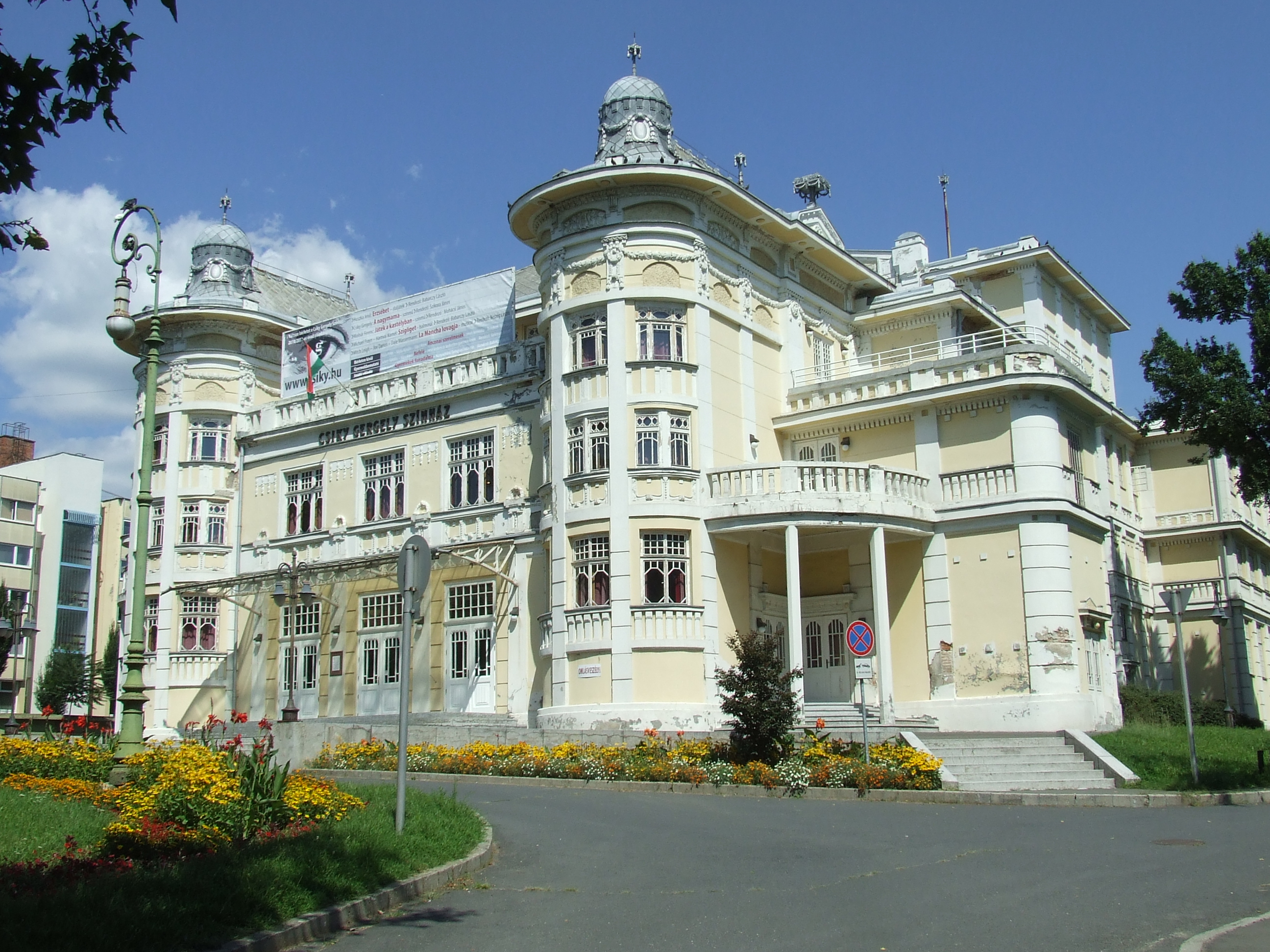 A Csiky Gergely Színház épülete a kaposvári Rákóczi téren. Műemlék. Épült Magyar Ede és Stahl József tervei szerint, szecessziós stílusban 1911-ben